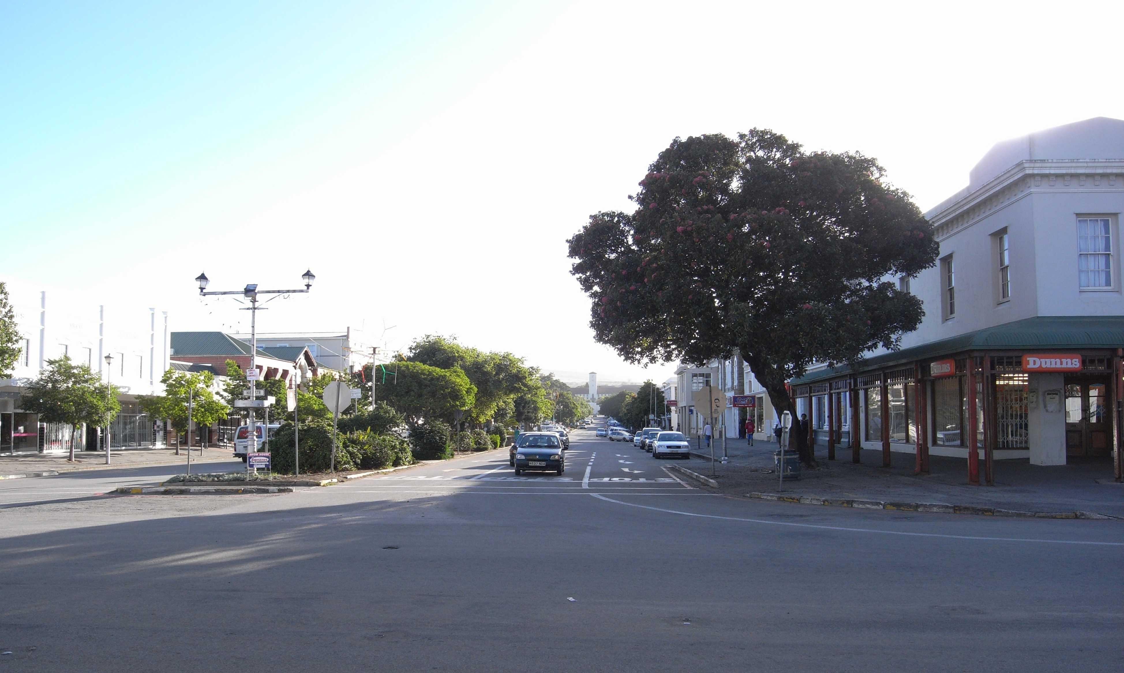 Grahamstown, Hill Street, view of Rhodes University (main building)